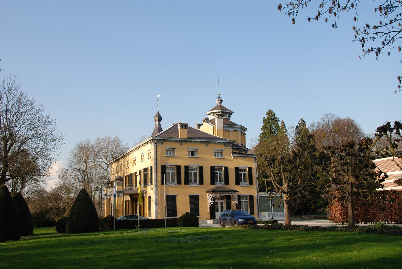 Limburgs: Hoes Kruisdonk in Raotem, gemeinte Mestreech